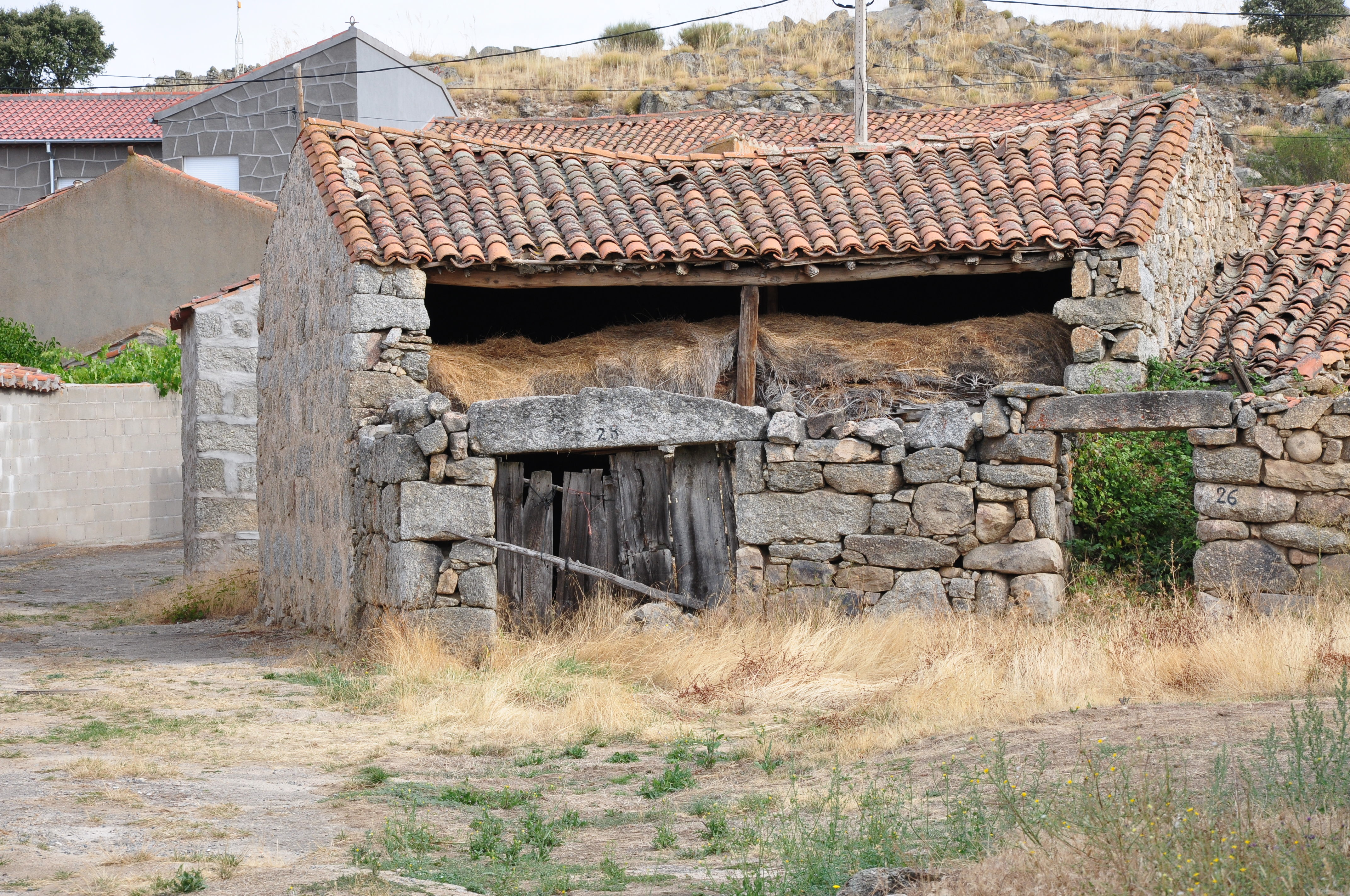 Pajar en Oco-La Torre, Ávila, España.